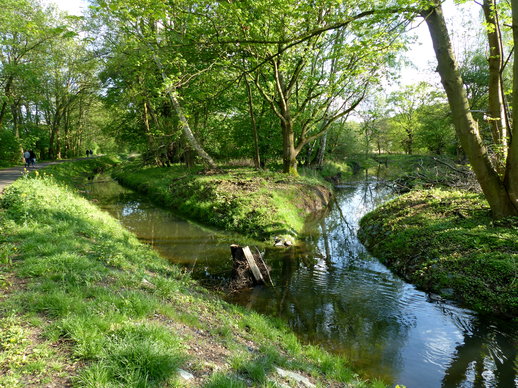 Mittelriede am Tafelmakerweg: Zusammenfluss alter und neuer Bachverlauf, Blickrichtung stromaufwärts, der neu geschaffene (ursprüngliche) Bachverlauf ist rechts.